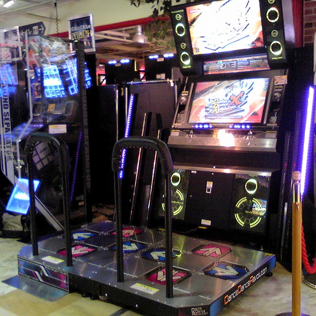 Cabina de DDRX widescreen